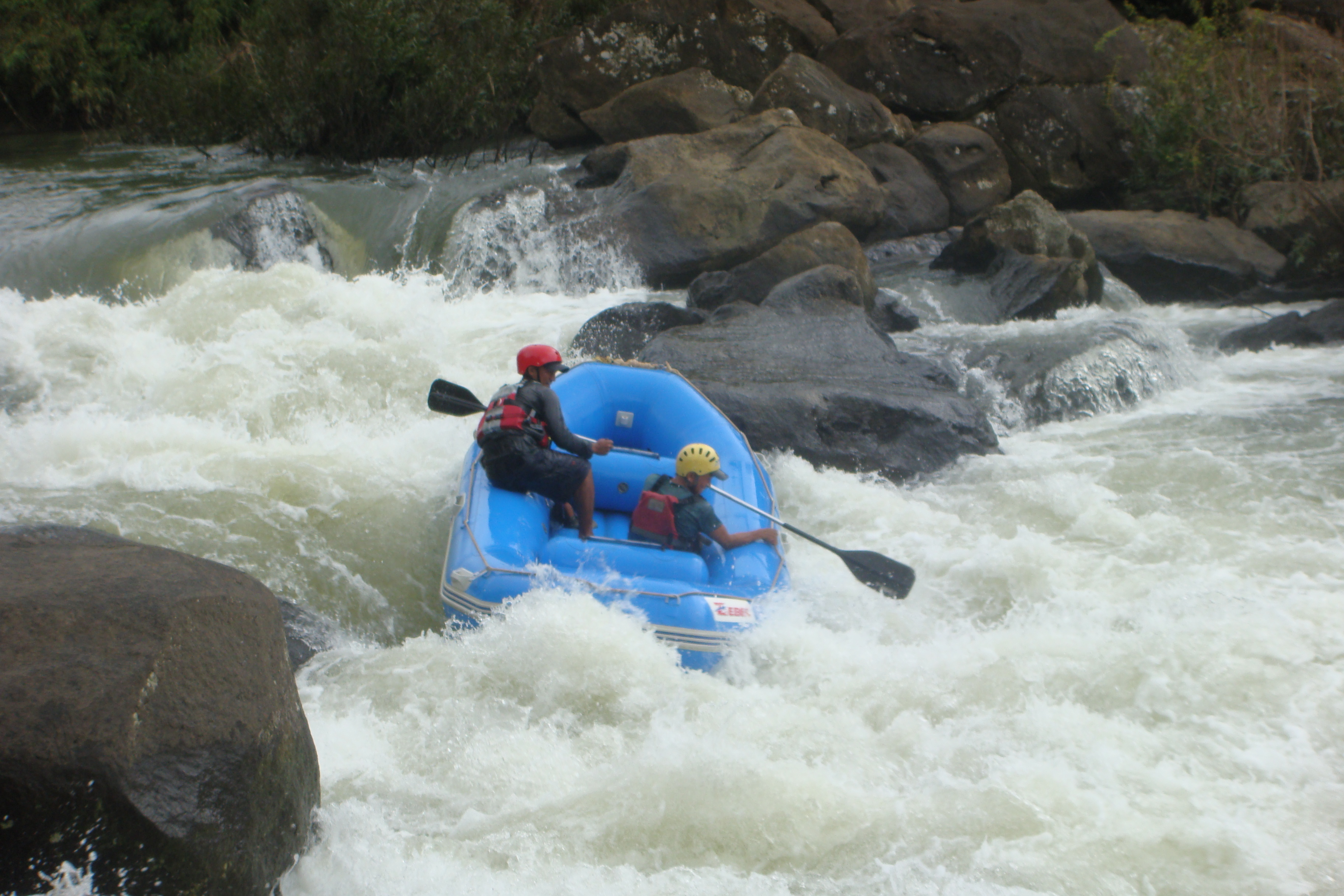 Near Kutta